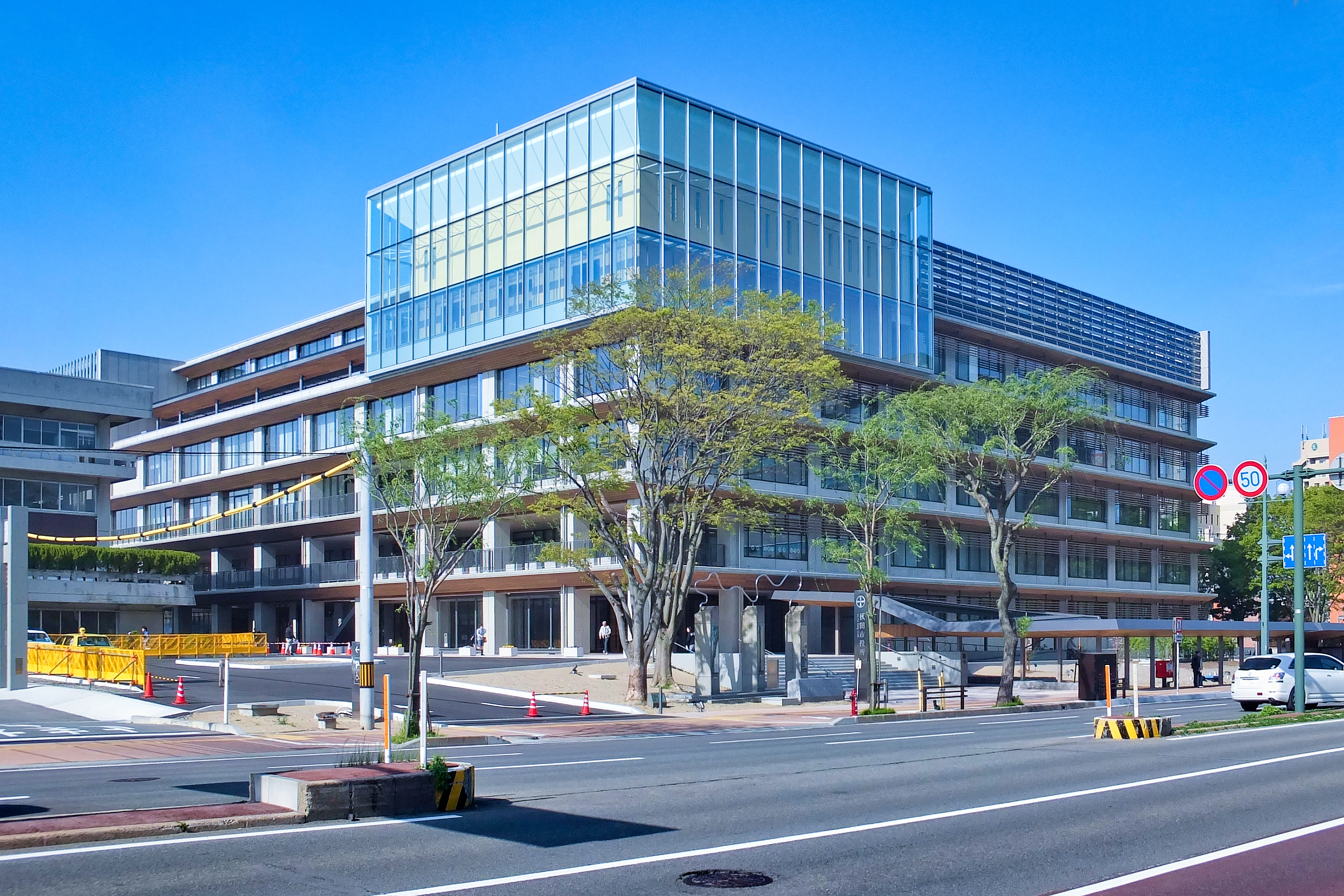 2016年4月26日に竣工した秋田市役所新庁舎。同5月6日より業務を開始した。山王大通りを挟んで秋田県庁側より撮影